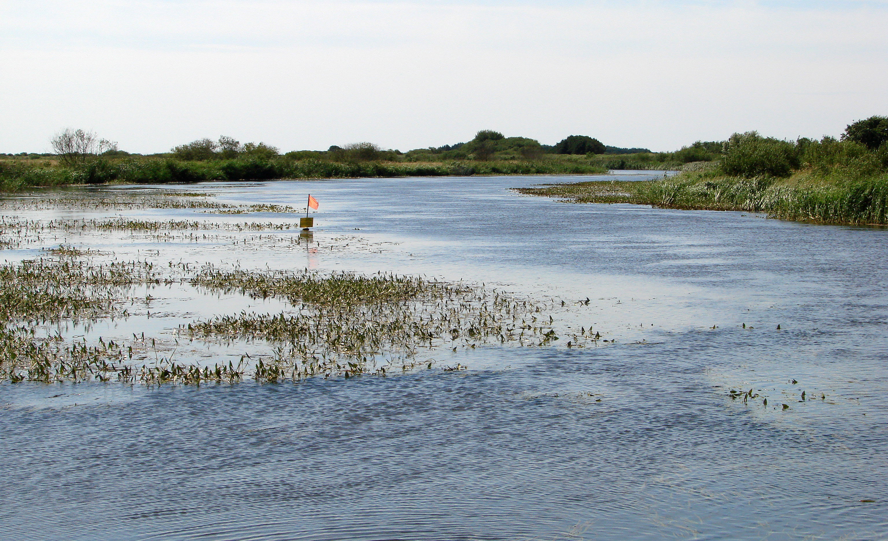 Skjern Å, nordre løb i Skjern Enge; taget fra trækfærgen over åen